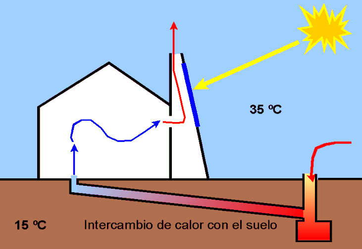 Esquema de funcionamiento de una chimenea solar